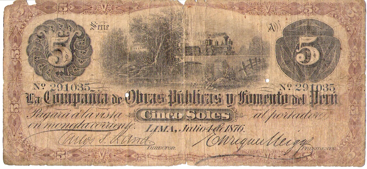 Billete